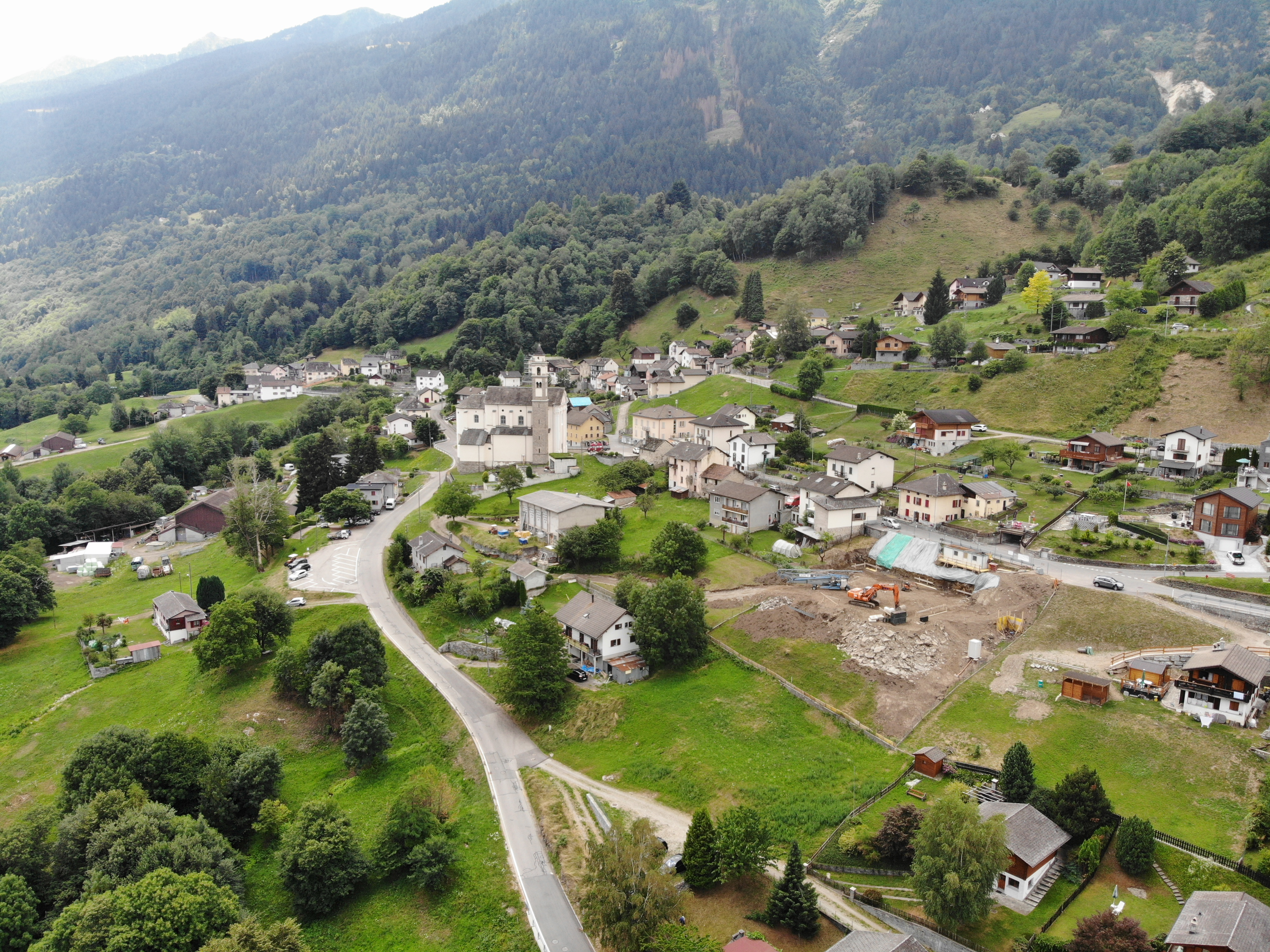 Marolta